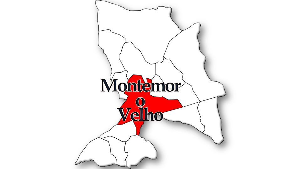 População